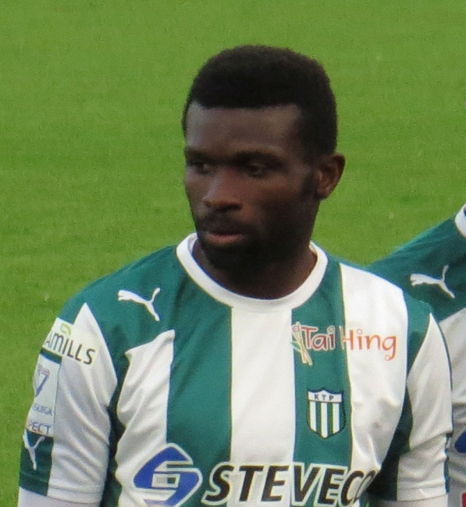 Babatunde Wusu, nigerialais-suomalainen jalkapalloilija FC KTP:n joukkueessa kaudella 2015.